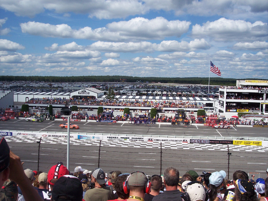 Pennsyvania 500